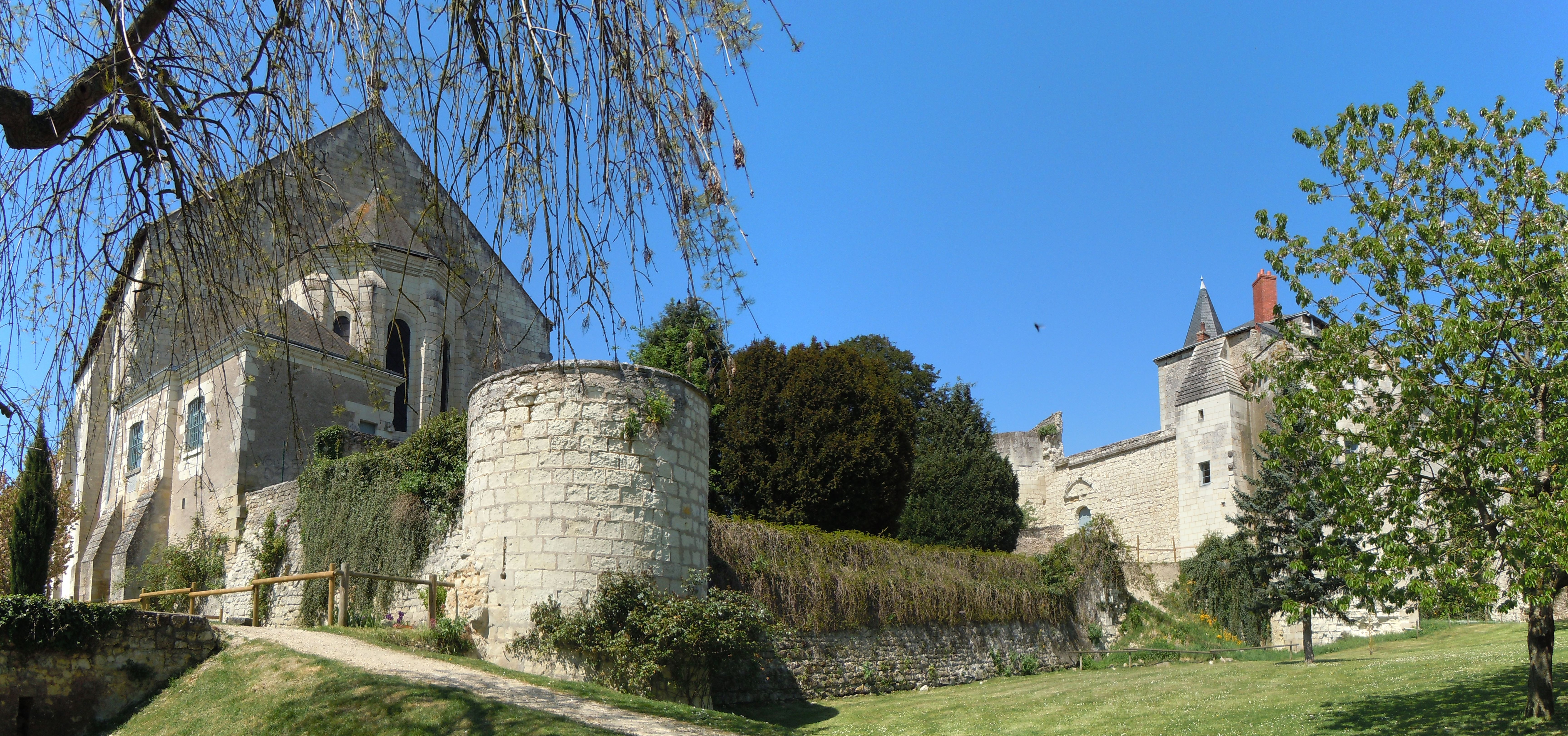 Église et château de Sainte-Maure-de-Touraine